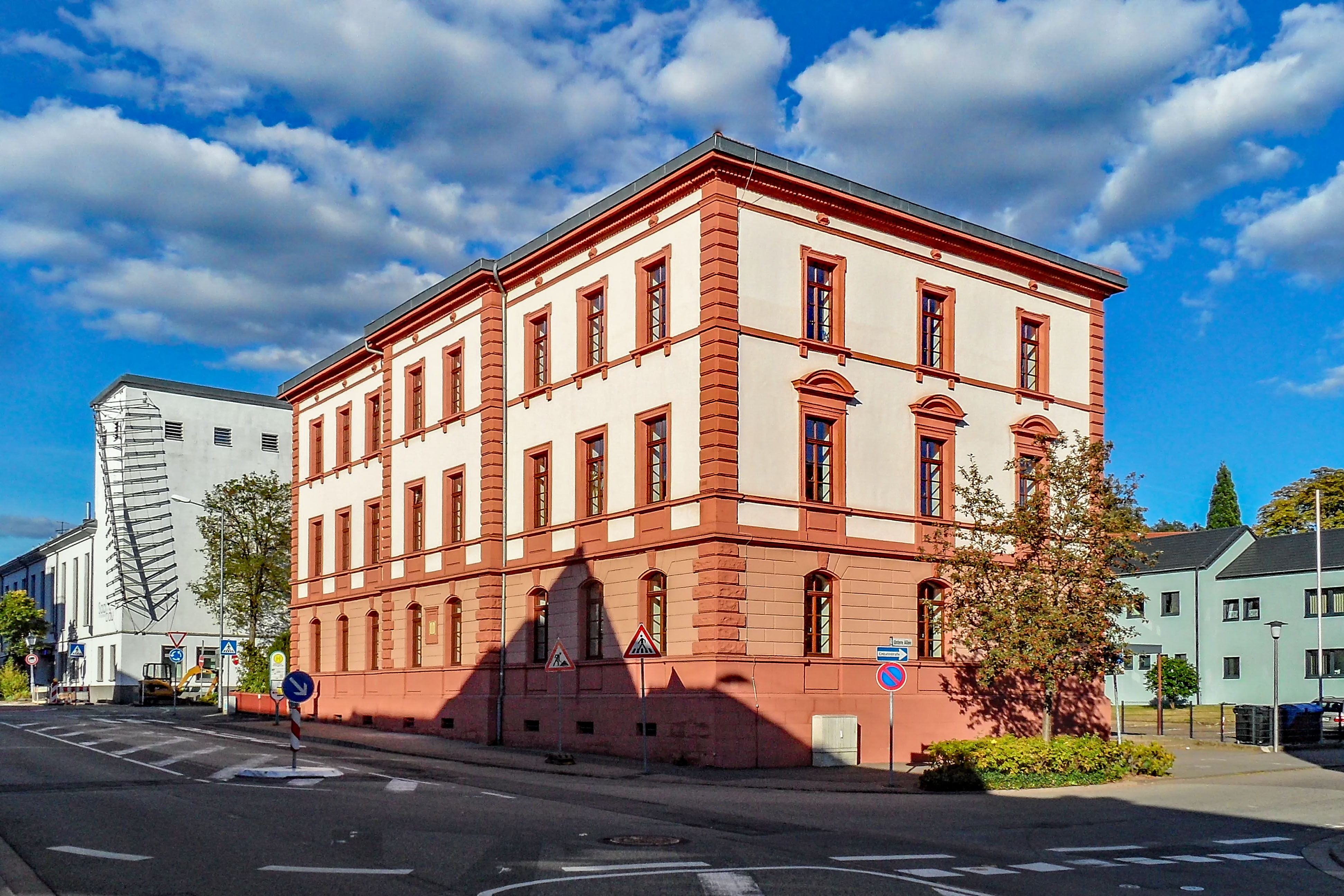 Amtsgericht Homburg (Saar)